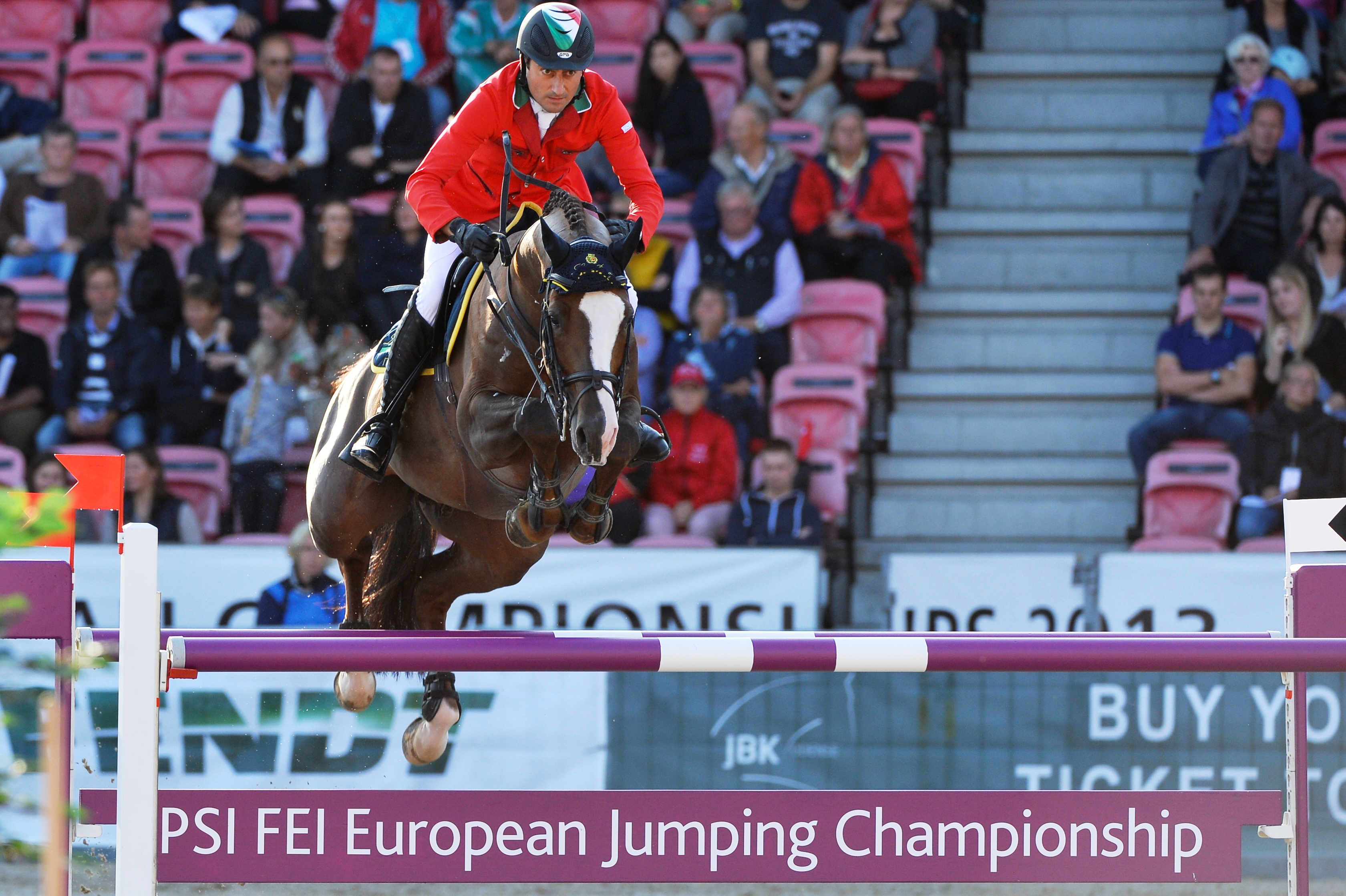 Piergiorgio Bucci in sella a Casallo Z